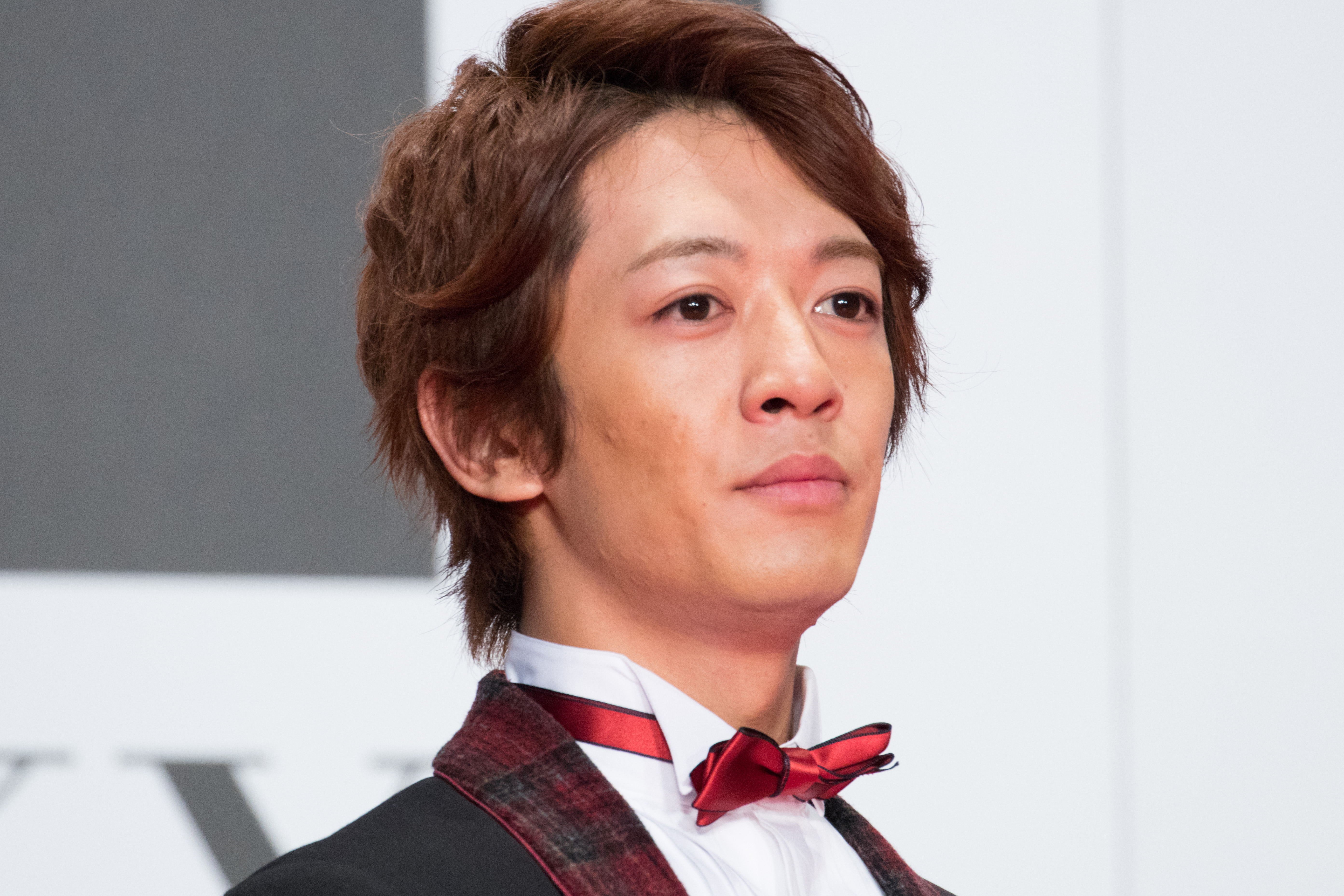 第29回 東京国際映画祭 オープニングセレモニー 大倉士門 (イタズラなKiss THE MOVIE ～ハイスクール編～)